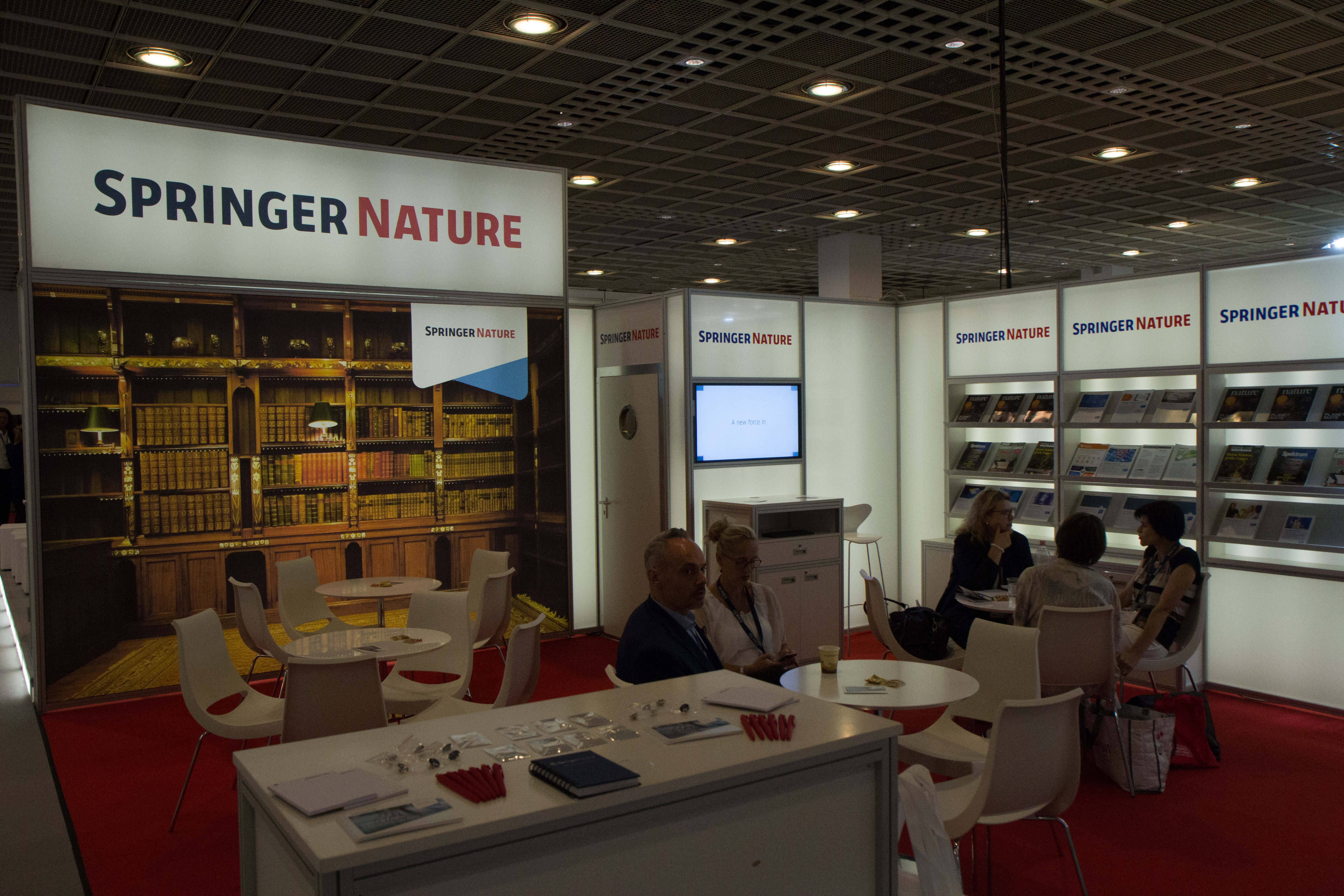 106. Deutscher Bibliothekartag in Frankfurt/Main